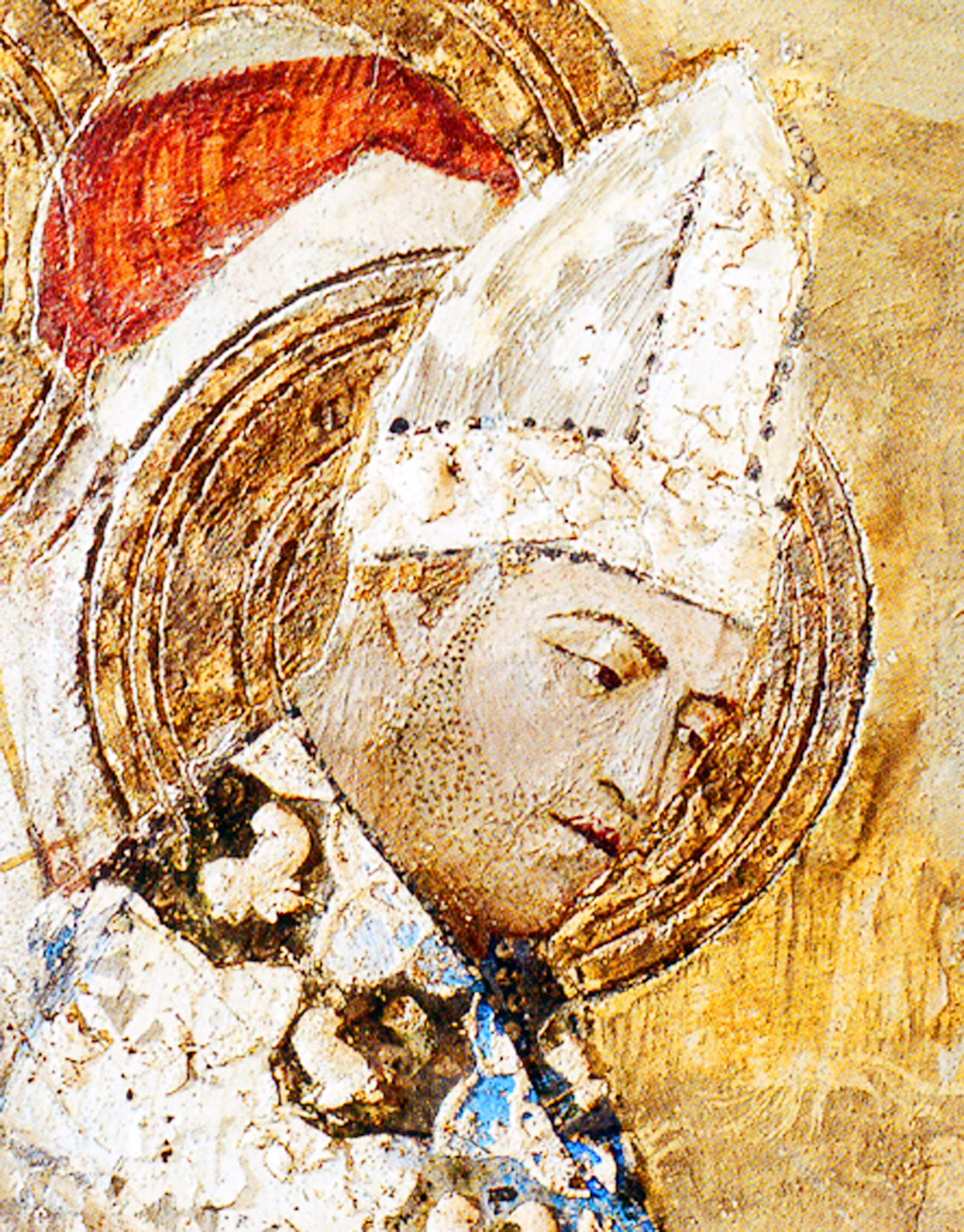 Clément VI : Fresque de Mario Giovanetti dans la chapelle Saint-Martial (XIV°).